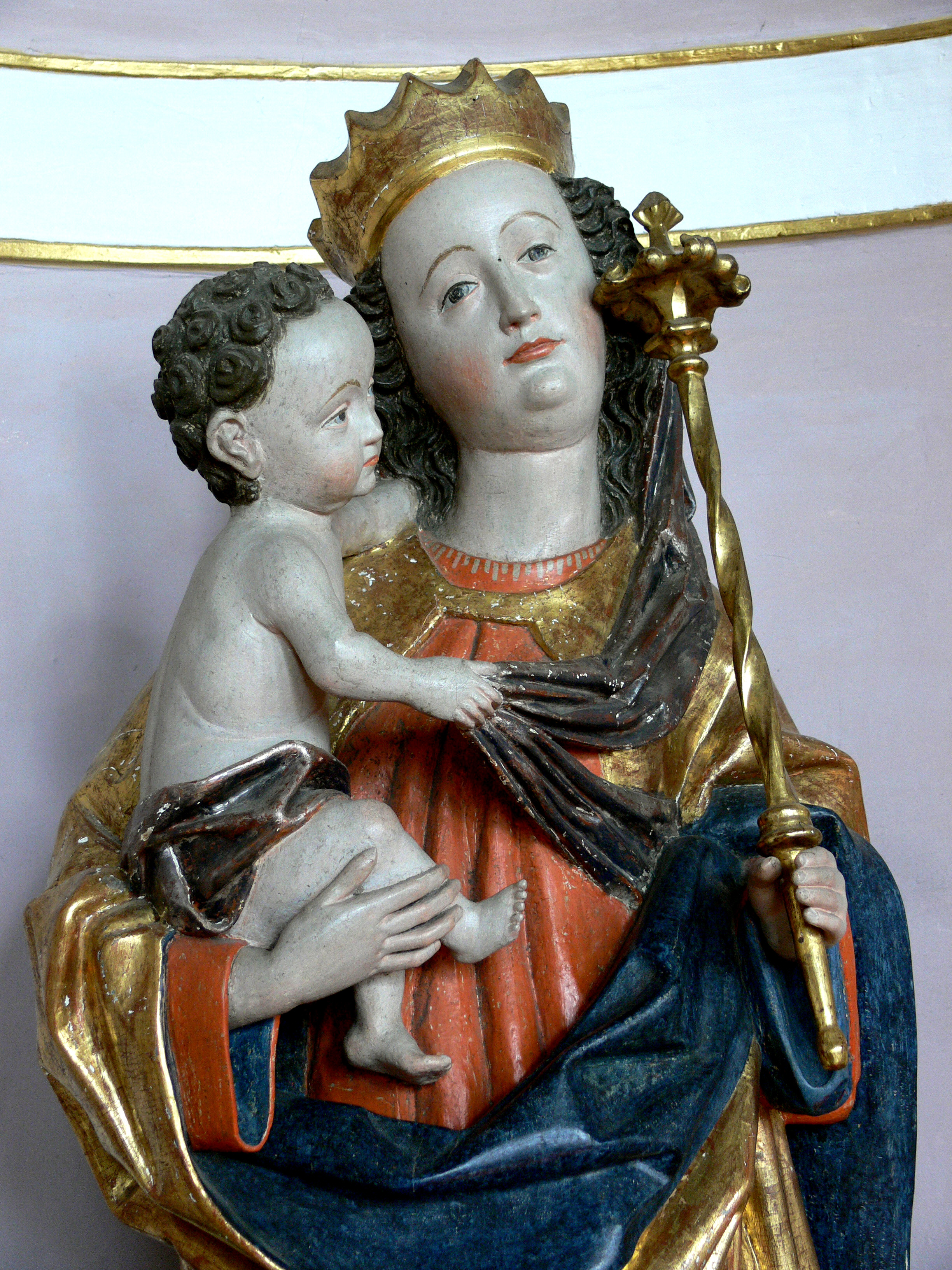 Madonna mit Kind, um 1475, von Ivo Strigel aus Memmingen Pfarrkirche St. Oswald, Otterswang Bad Schussenried, Landkreis Biberach, Baden-Württemberg